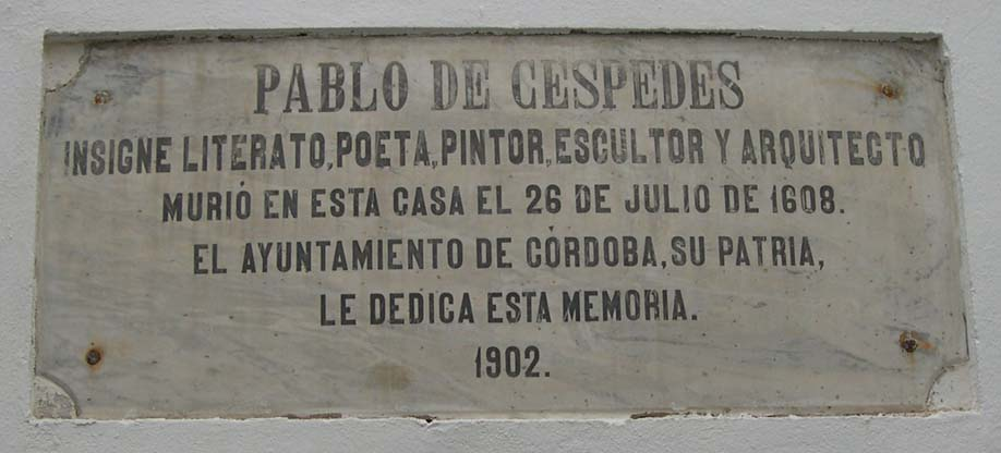 Placa conmemorativa de Pablo de Céspedes, en la casa donde falleció, en Córdoba, España